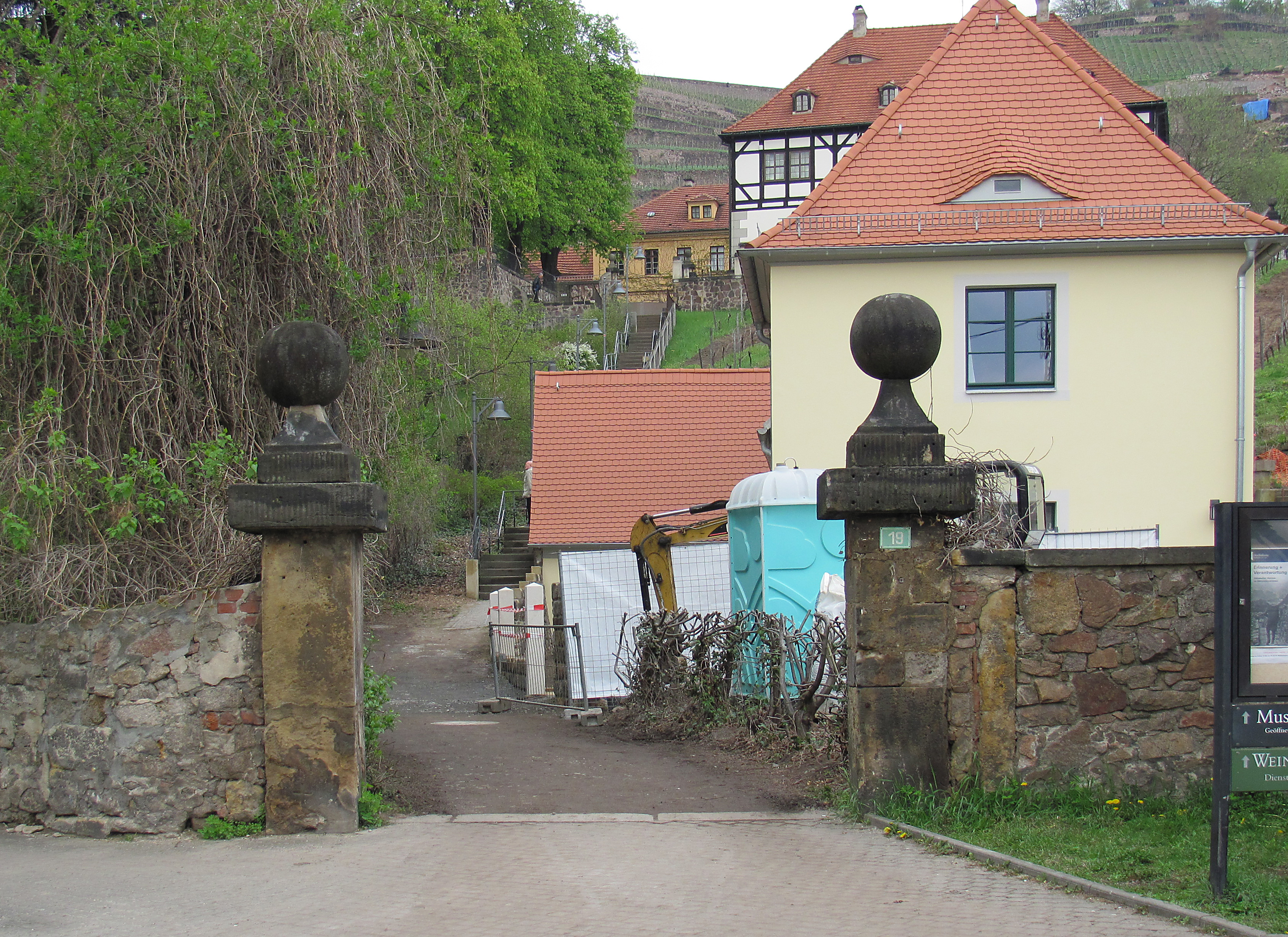 Radebeul, Toranlage Hoflößnitz (Teil von Winzerhaus, ehemaliges Backhaus und Toranlage der Hoflößnitz)